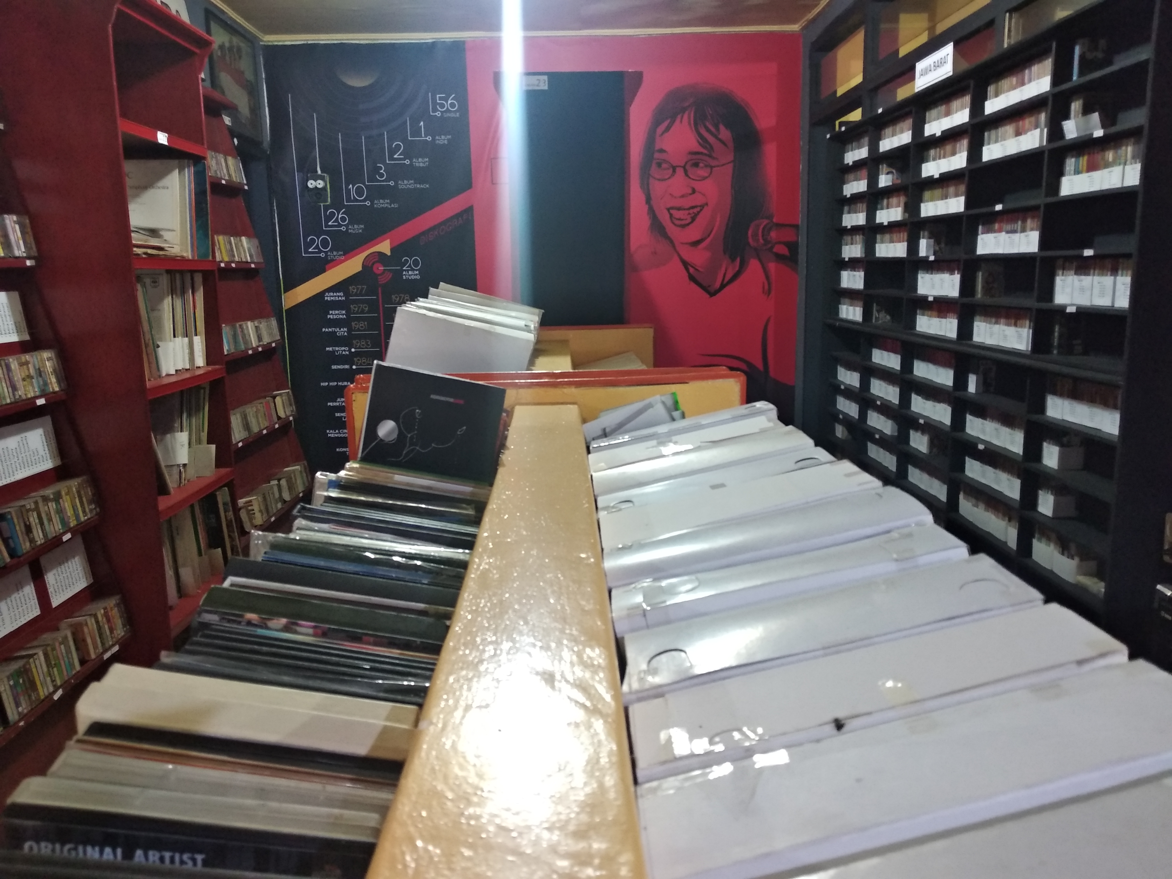 Beberapa koleksi CD yang tersimpan di Museum Musik Indonesia